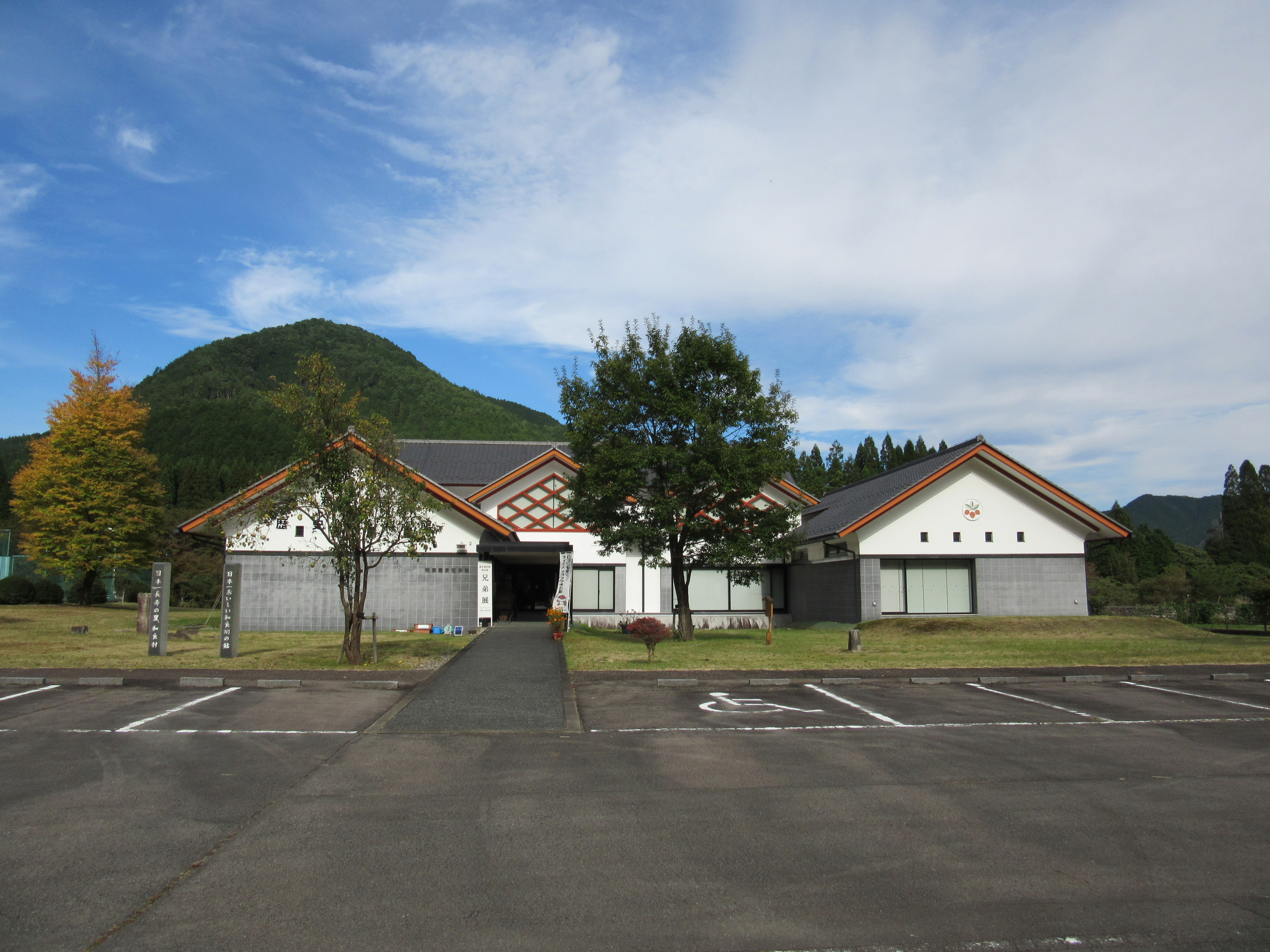 和良郷土資料館